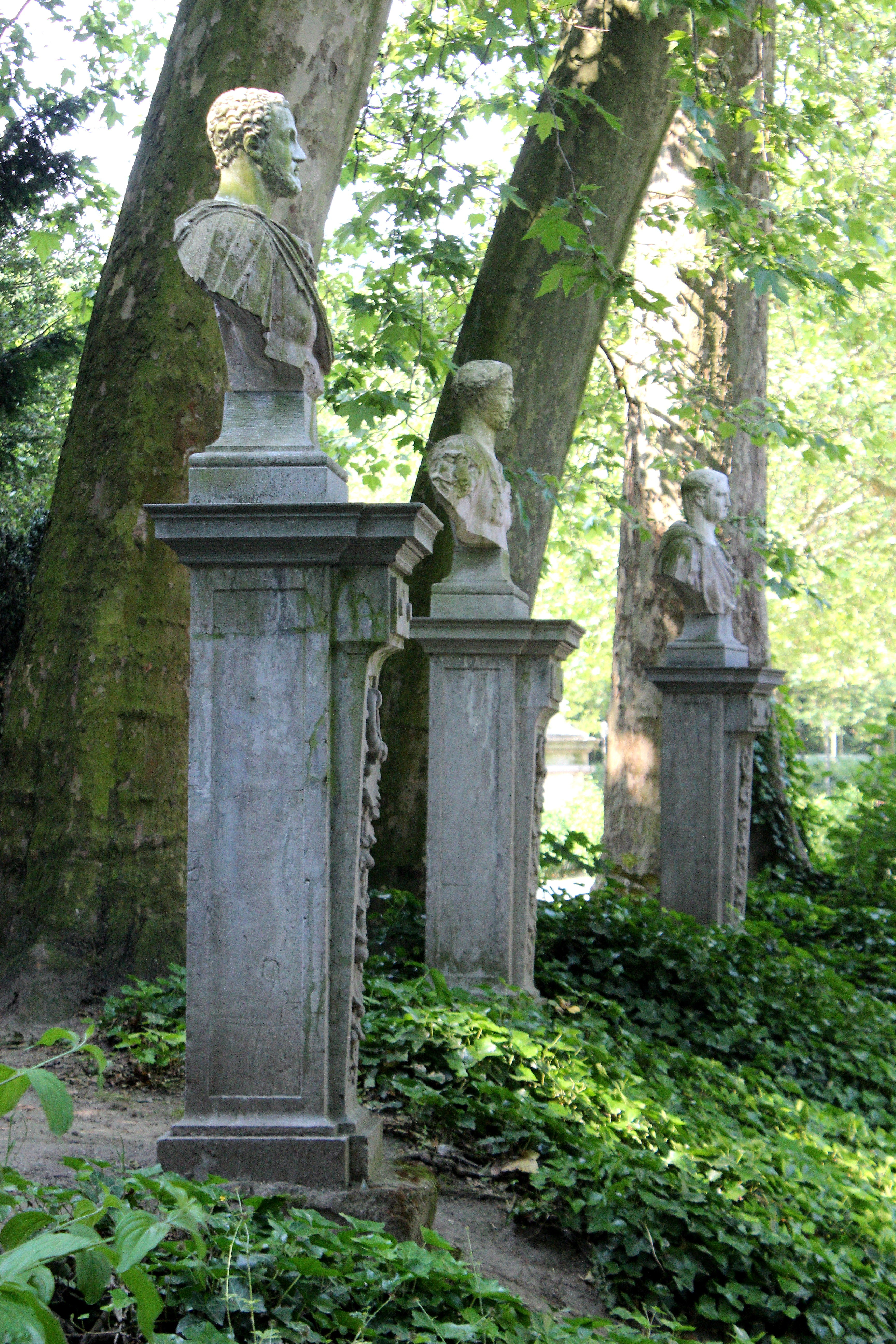 Statues d'empereurs romains autour du rond-point du parc de Bruxelles